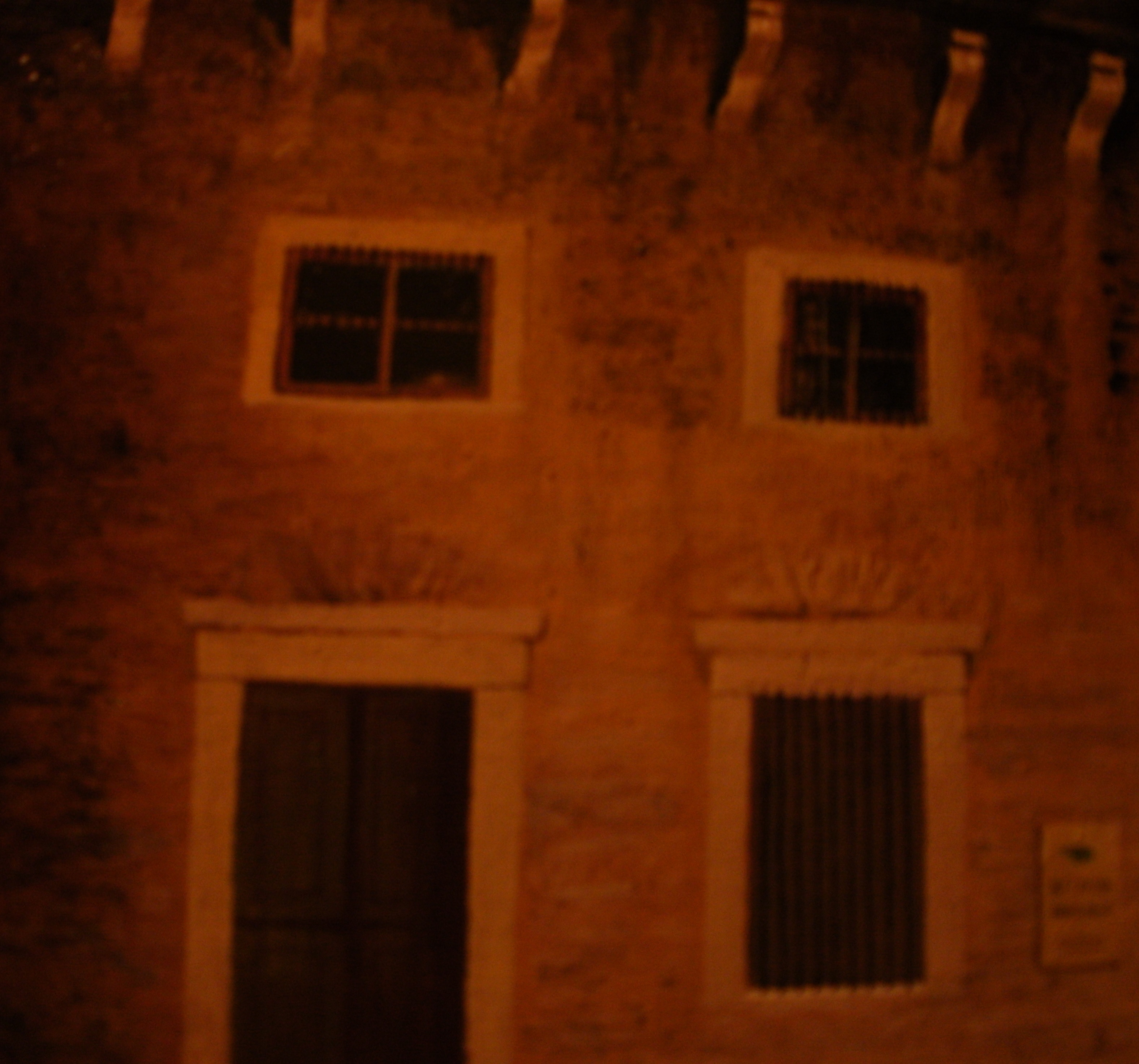 Δείγμα αρχιτεκτονικής